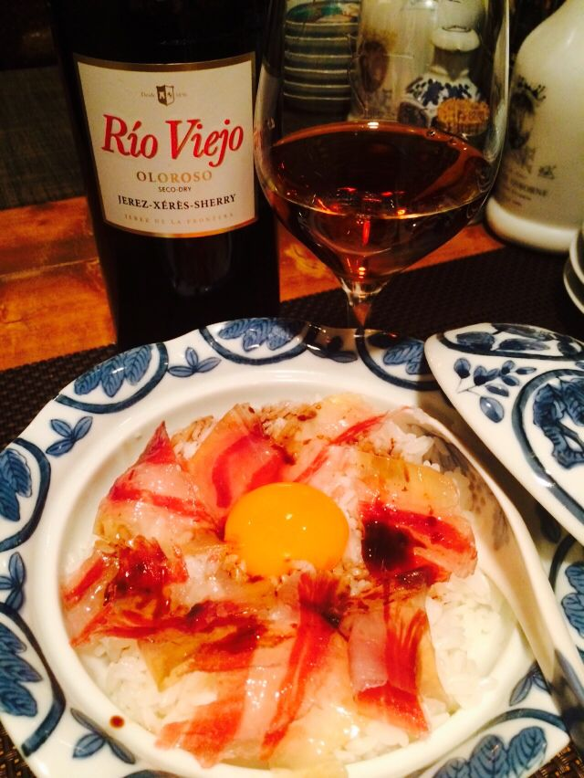 sherry museumの名物料理